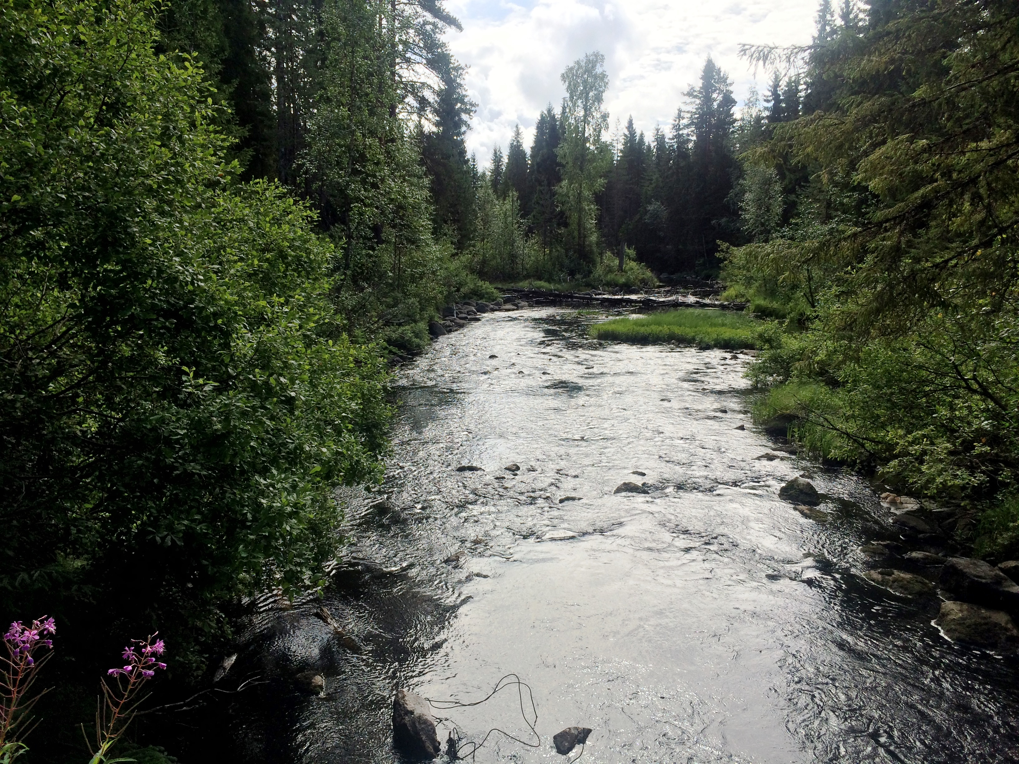 Варисйоки